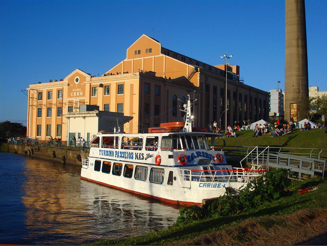 Usina do Gasômetro com barcos de passeio